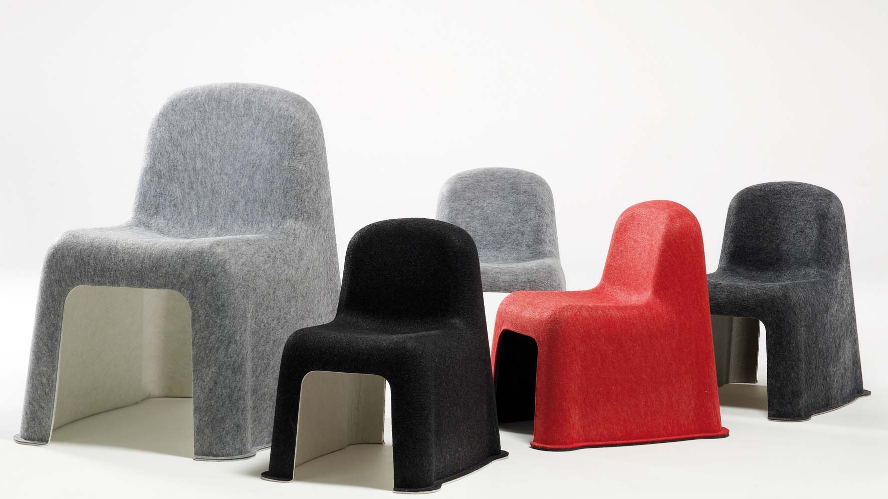 nobody chair family